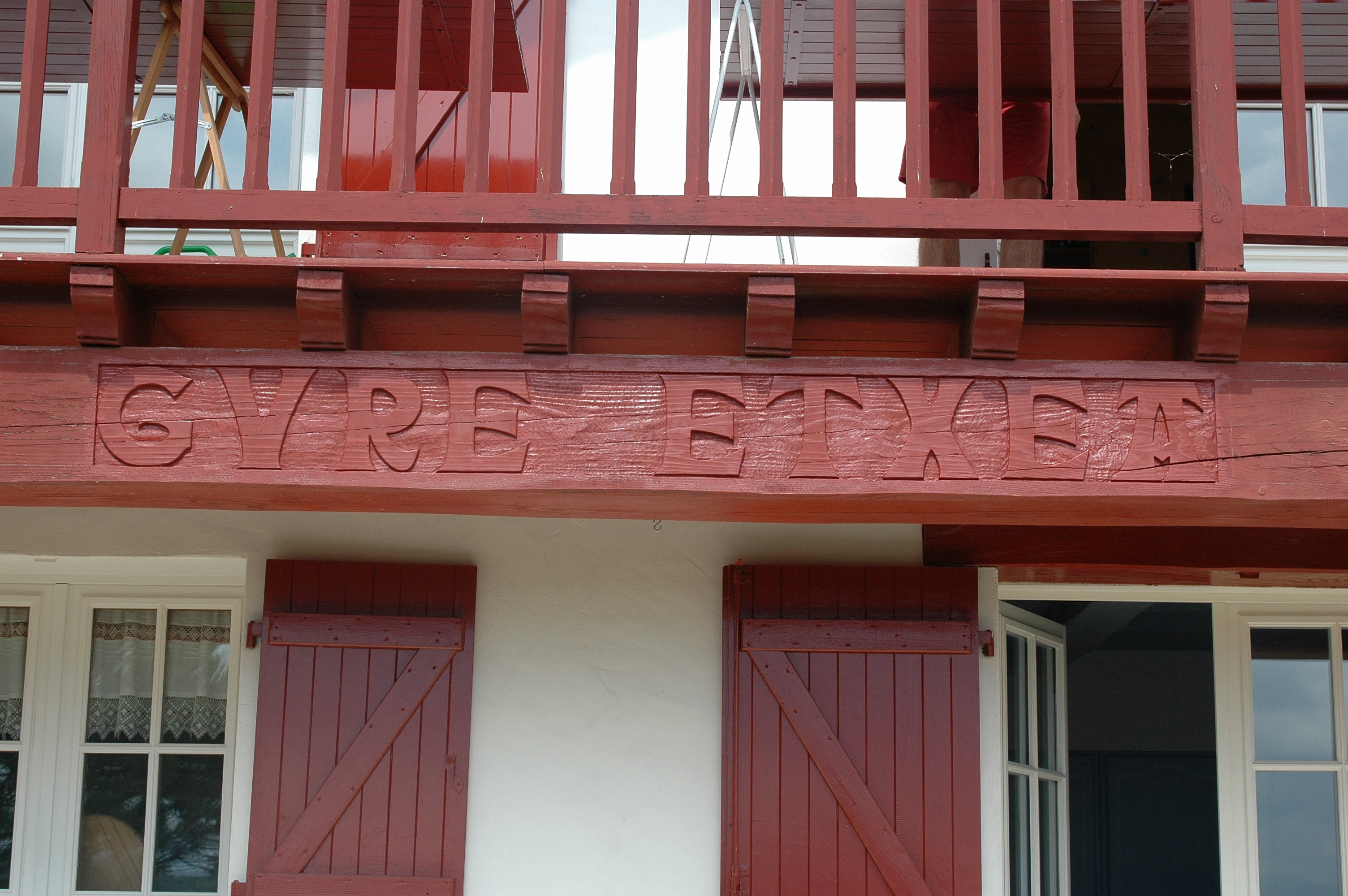 Ahetze, linteau au-dessus du Lorio, photo prise le 08/08/06 par Harrieta171